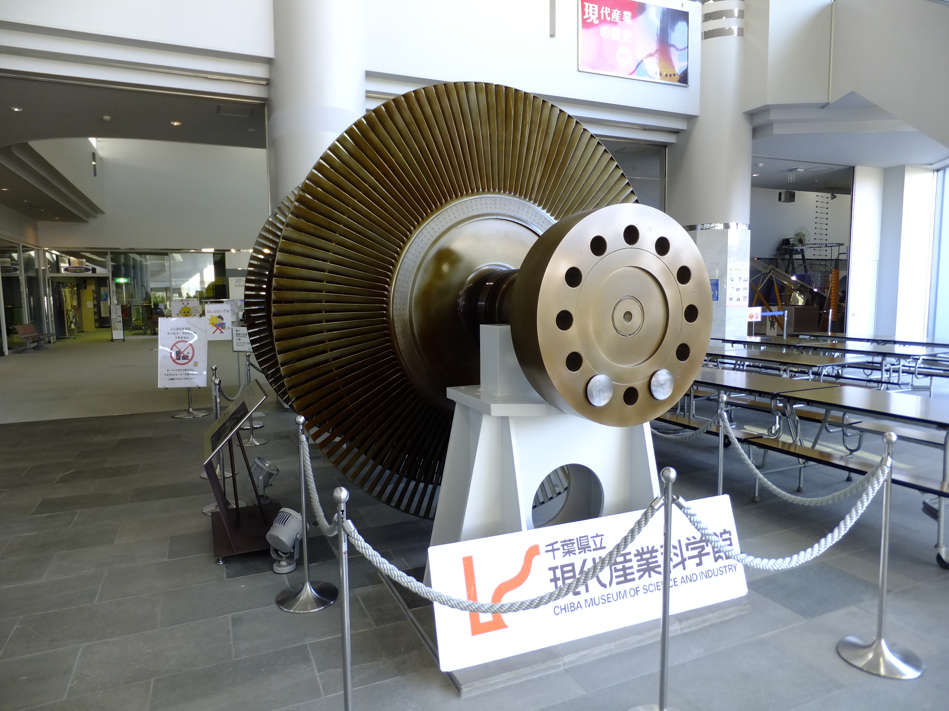 千葉県立現代産業科学館